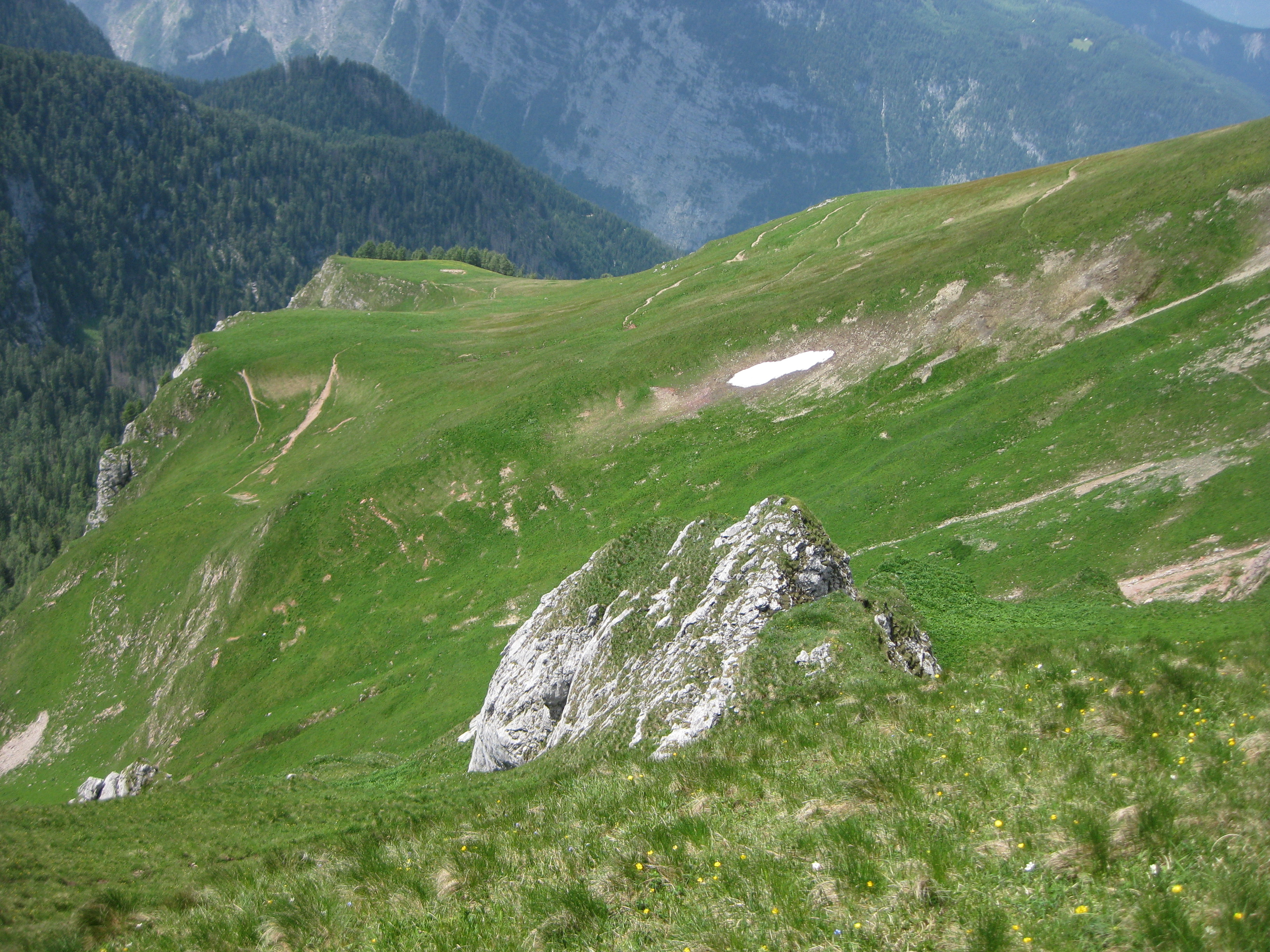 Oberes Roßfeld in den Gotzenbergen, Berchtesgadener Alpen, im Hintergrund das Watzmannmassiv.